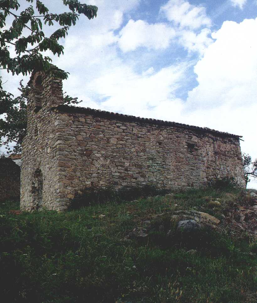 Trejuvell